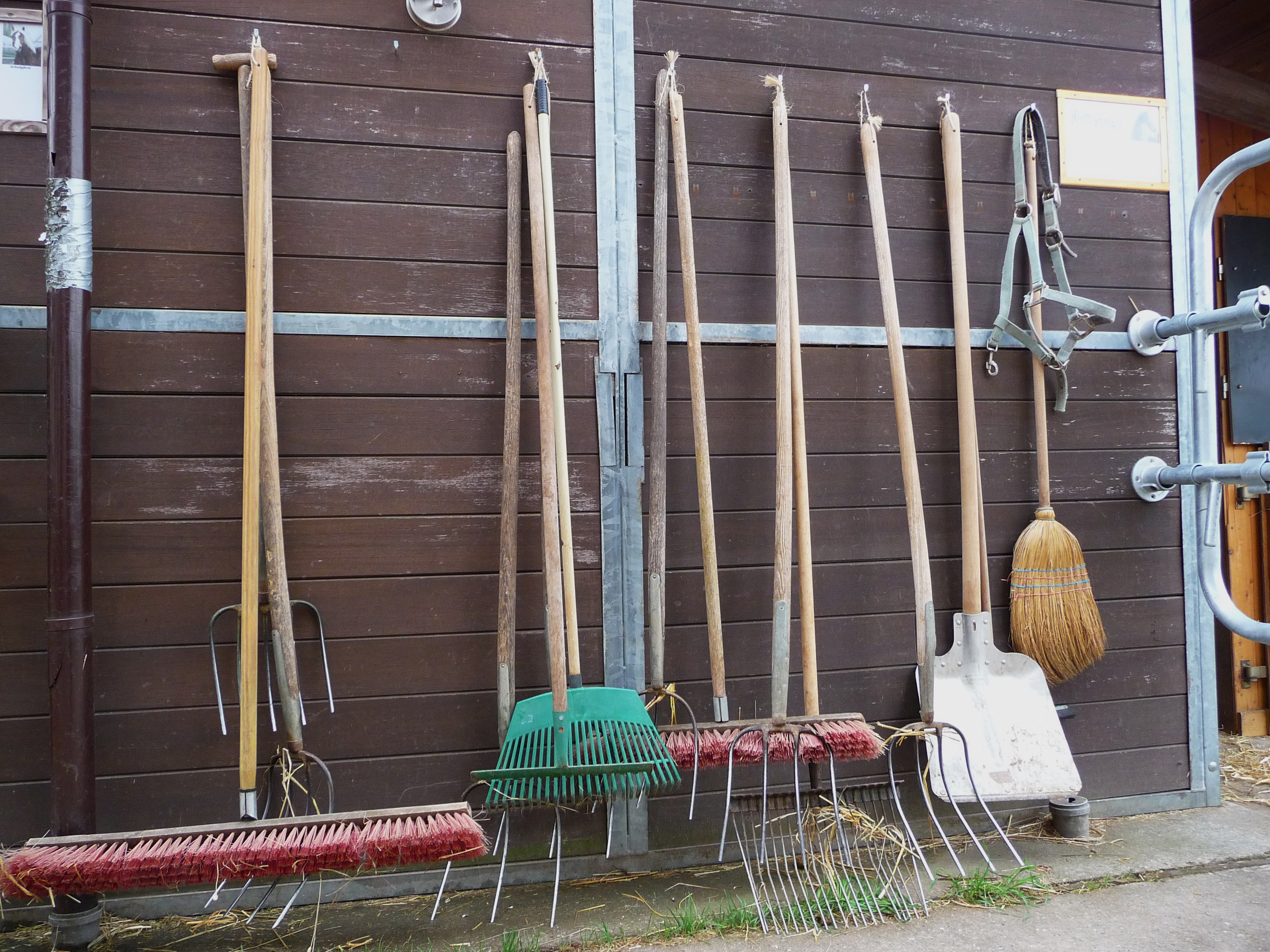 Gerätschaften für die Stallarbeit, fotografiert auf einem Reiterhof in Heidelberg (Baden-Württemberg, Deutschland)